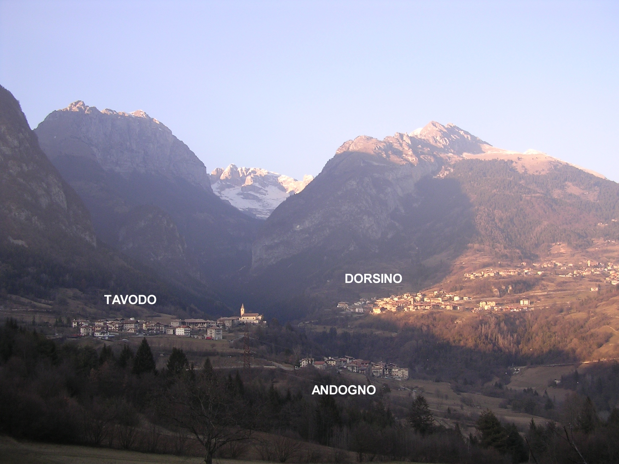 Dorsino con le frazioni Tavodo e Andogno (provincia di Trento)